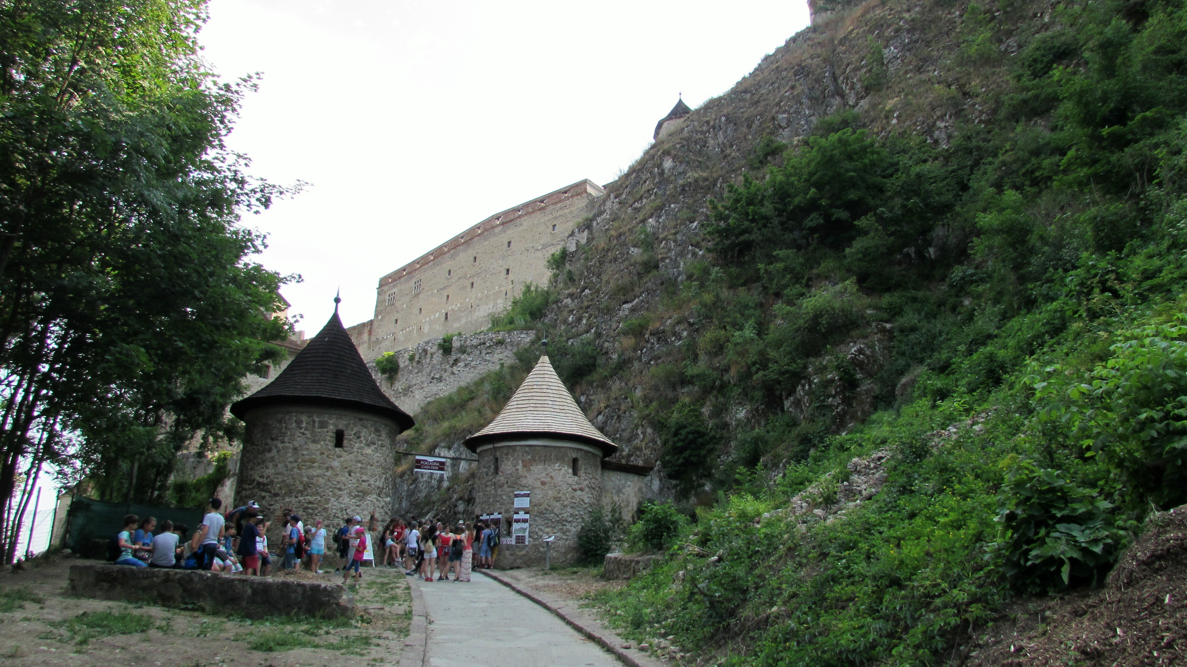 Trencin Ansicht-1